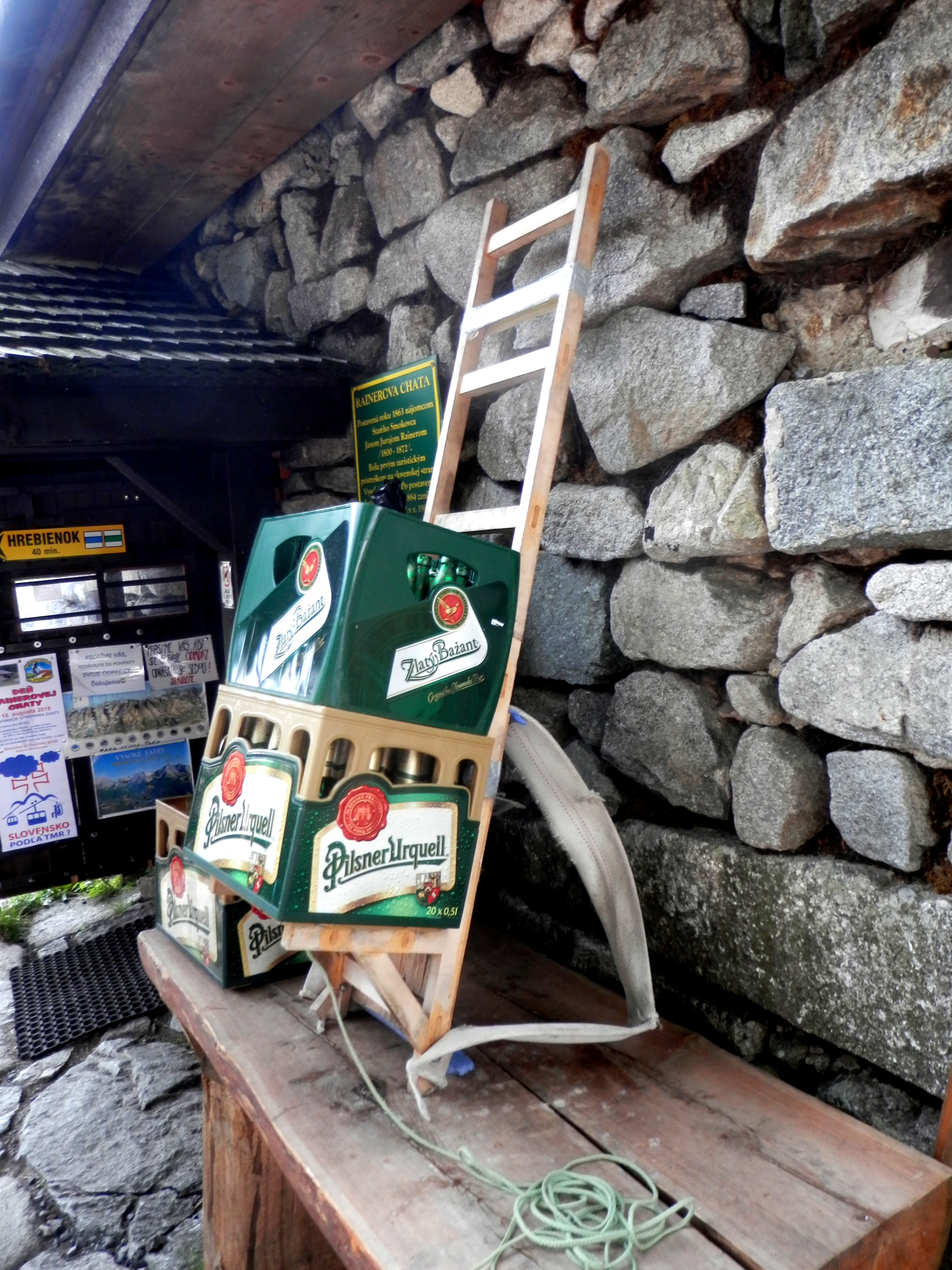 Rainerova útulňa (chata). Dal ju postaviť Ján Juraj Rainer. Slúži od roku 1865. Dnes je v nej umiestnené špecifické informačné centrum a múzeum nosičstva vo Vysokých Tatrách. Od Hrebienka je vzdialená asi 20 minút chôdze. Nachádza sa na poľane vo Veľkej Studenej doline vo výške asi 1300 metrov nad morom. Slovensko.